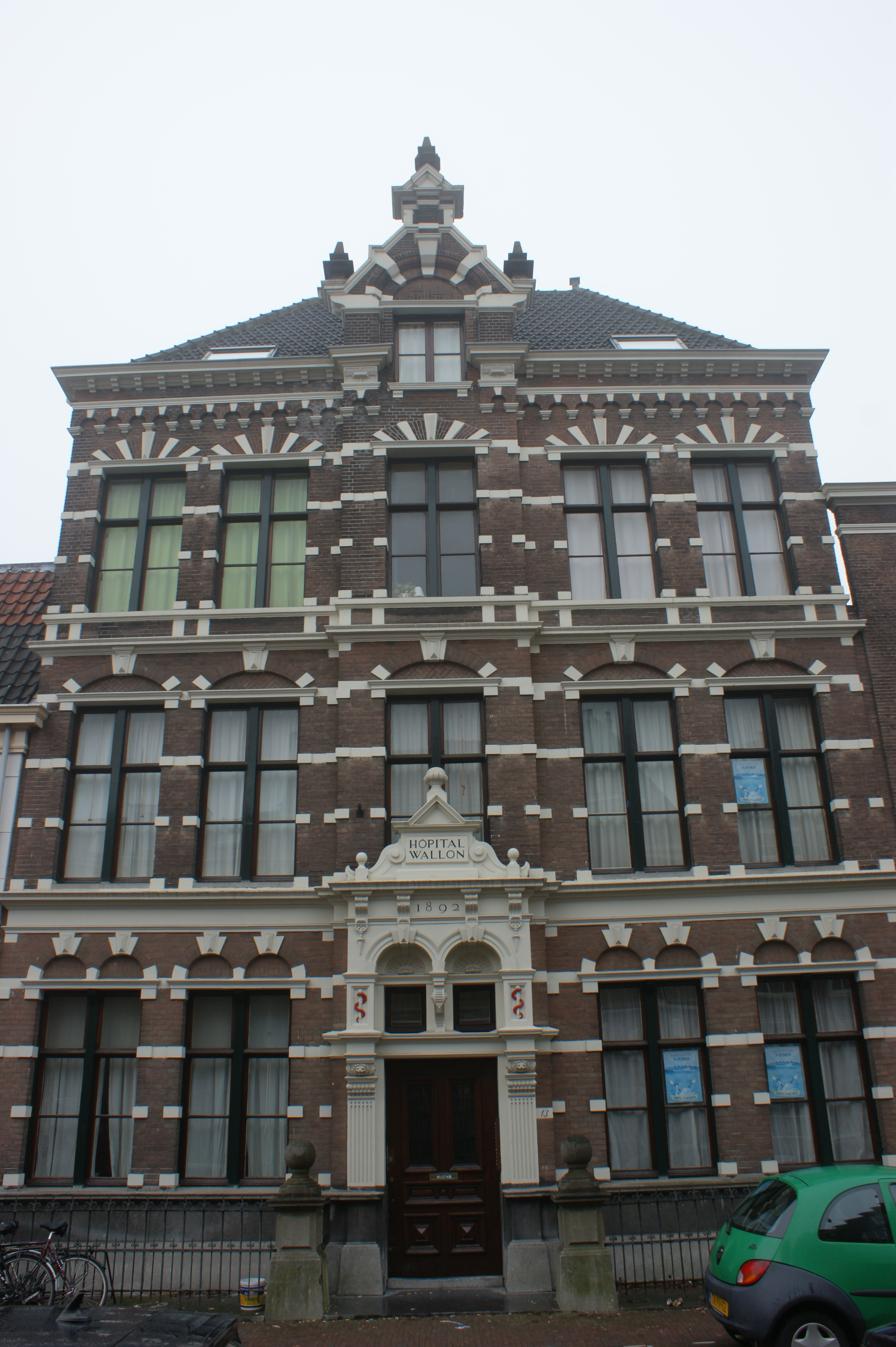 Leiden - Papengracht 13